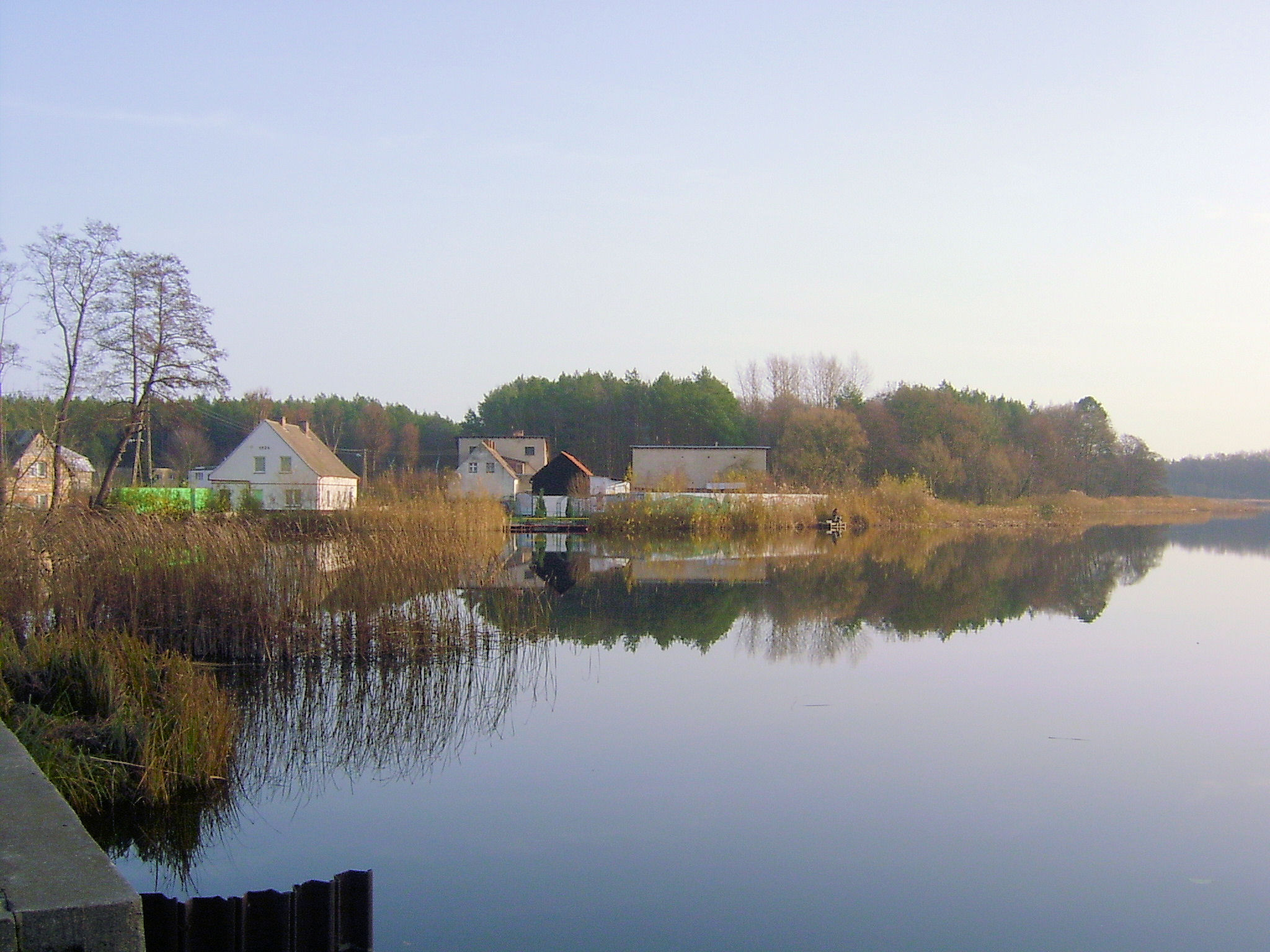 Jezioro Bukowieckie (dawniej Borowy Młyn) - gmina Międzyrzecz, woj. lubuskie.